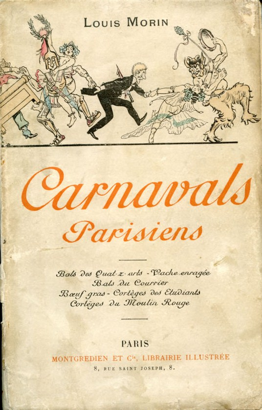 Couverture d'un livre